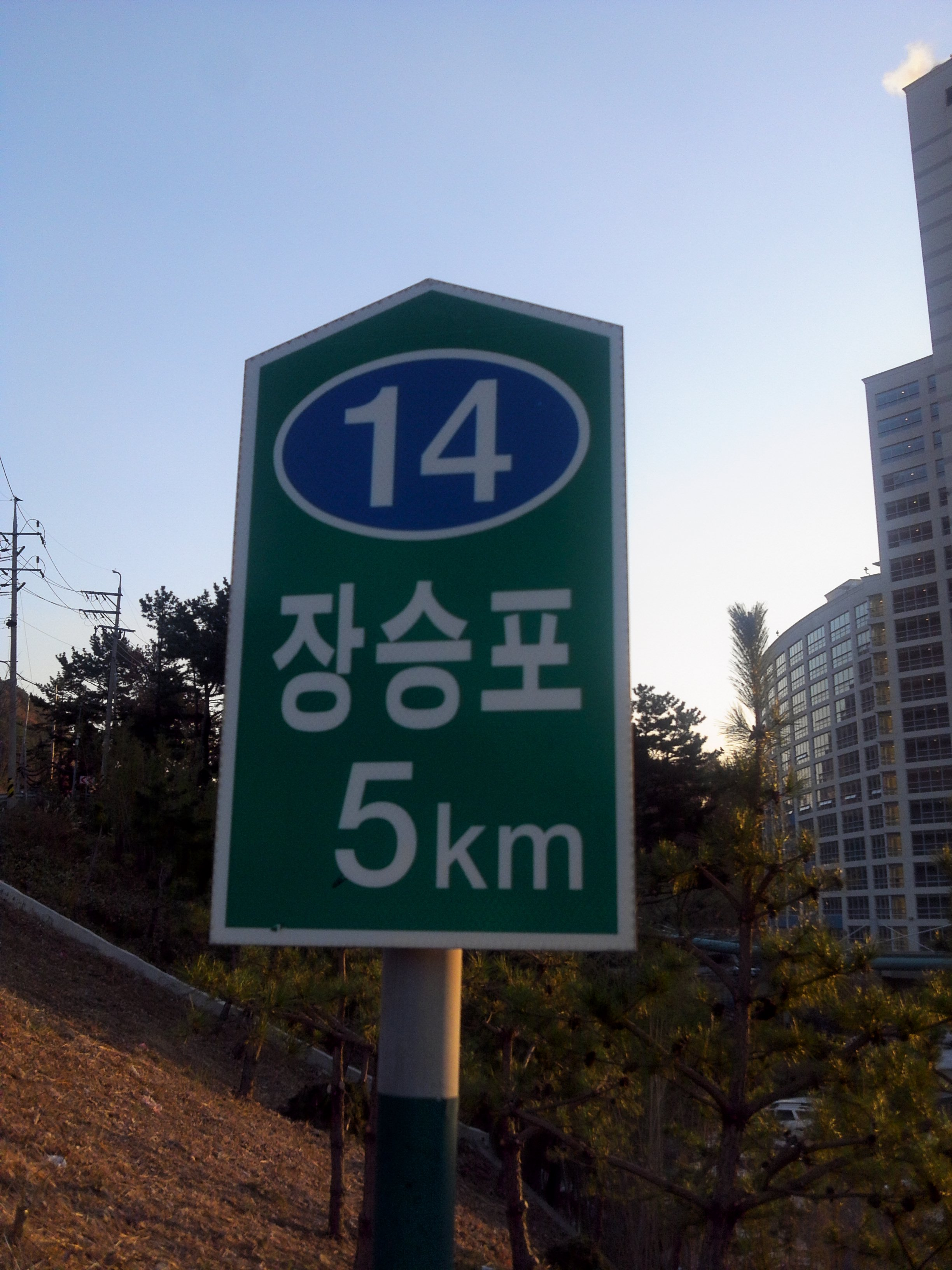 장승포5km